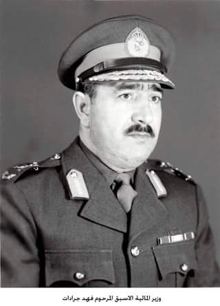 وزير الماليه الأسبق المرحوم فهد جرادات